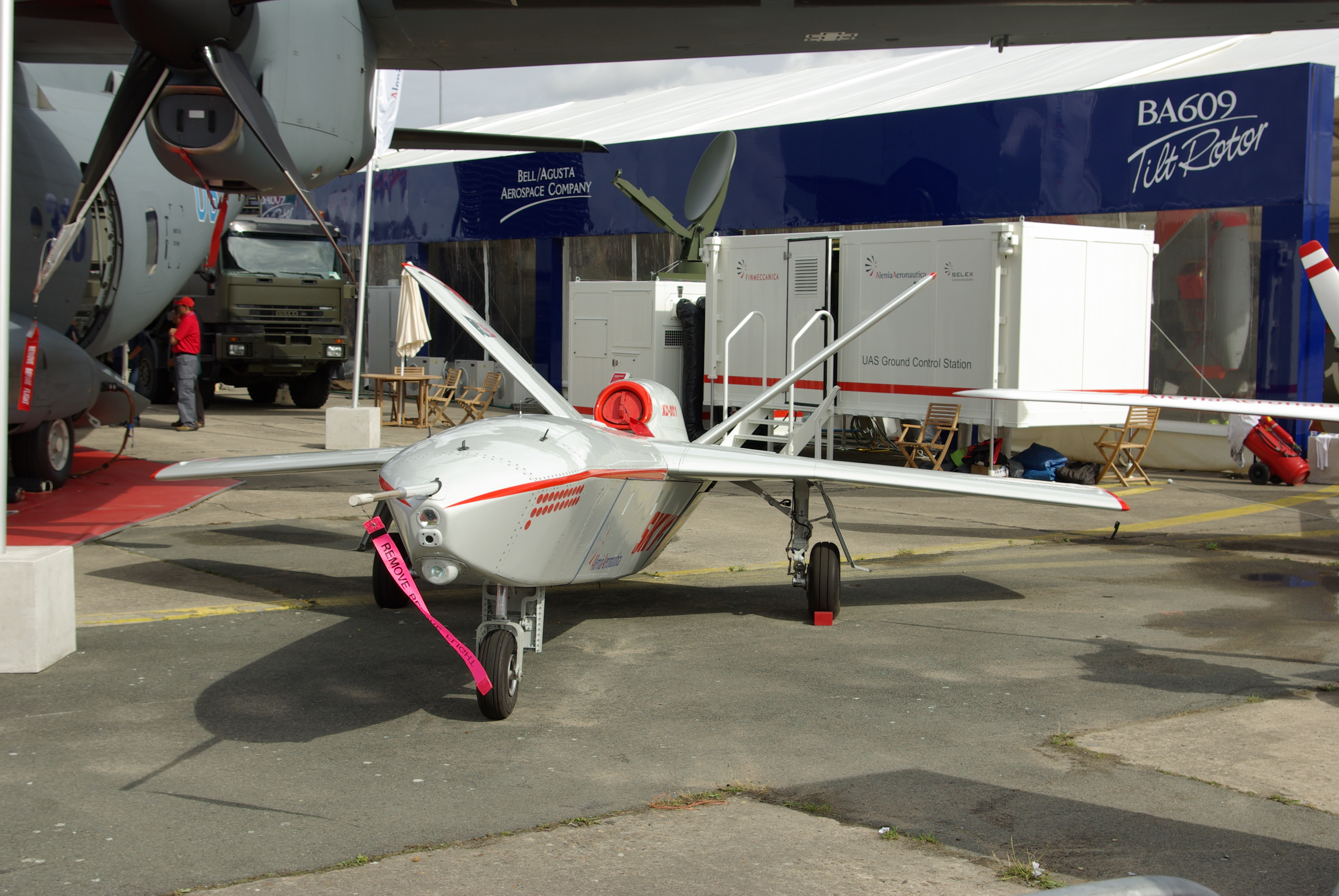 Alenia Aeronautica Sky-X